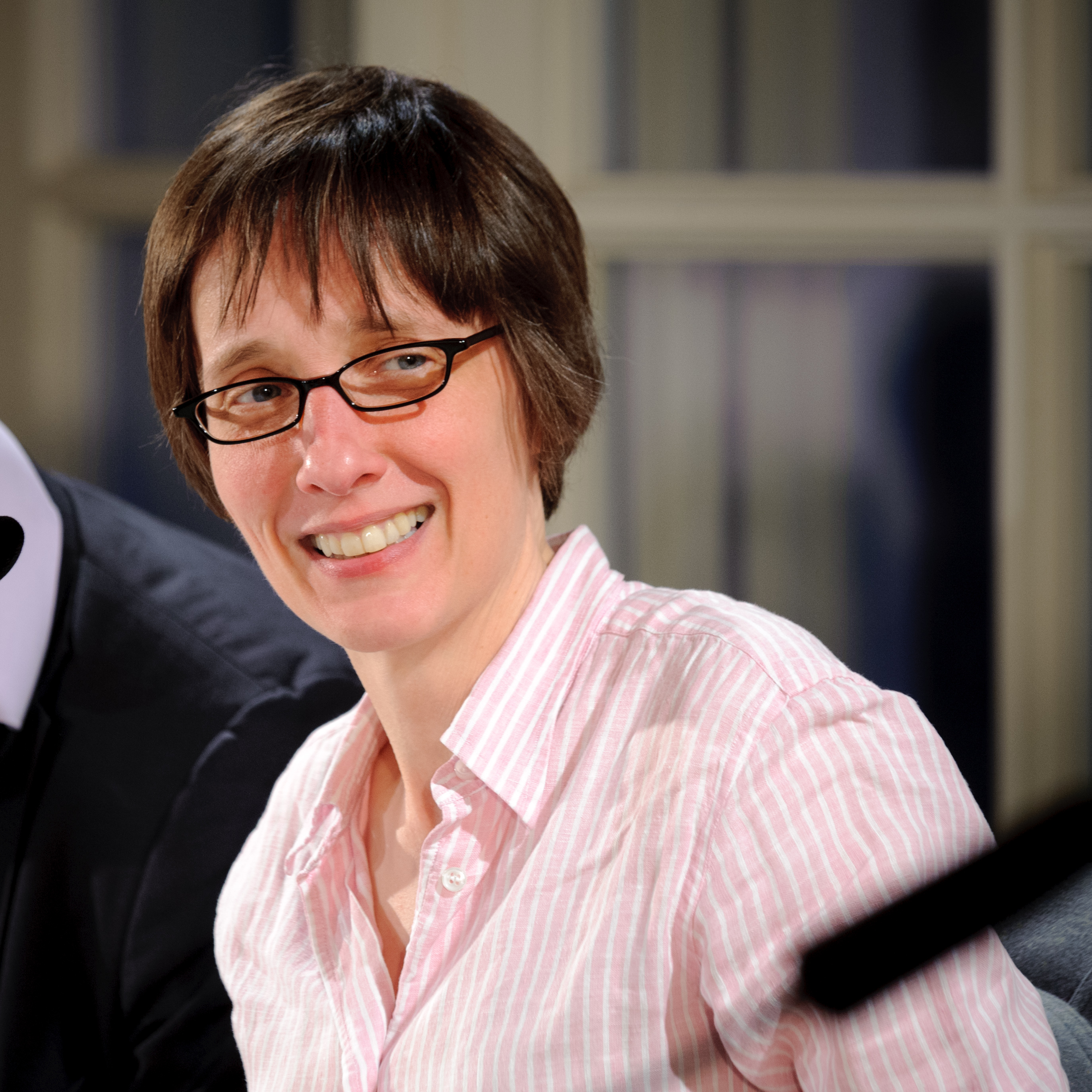 A. L. Kennedy (Schriftstellerin) Der Literarische Abend mit A. L. Kennedy A. L. Kennedy zu Gast bei den Schriftstellerinnen Hilal Sezgin und Veronika Peters, Mai 2012 Fotos: Stephan Röhl